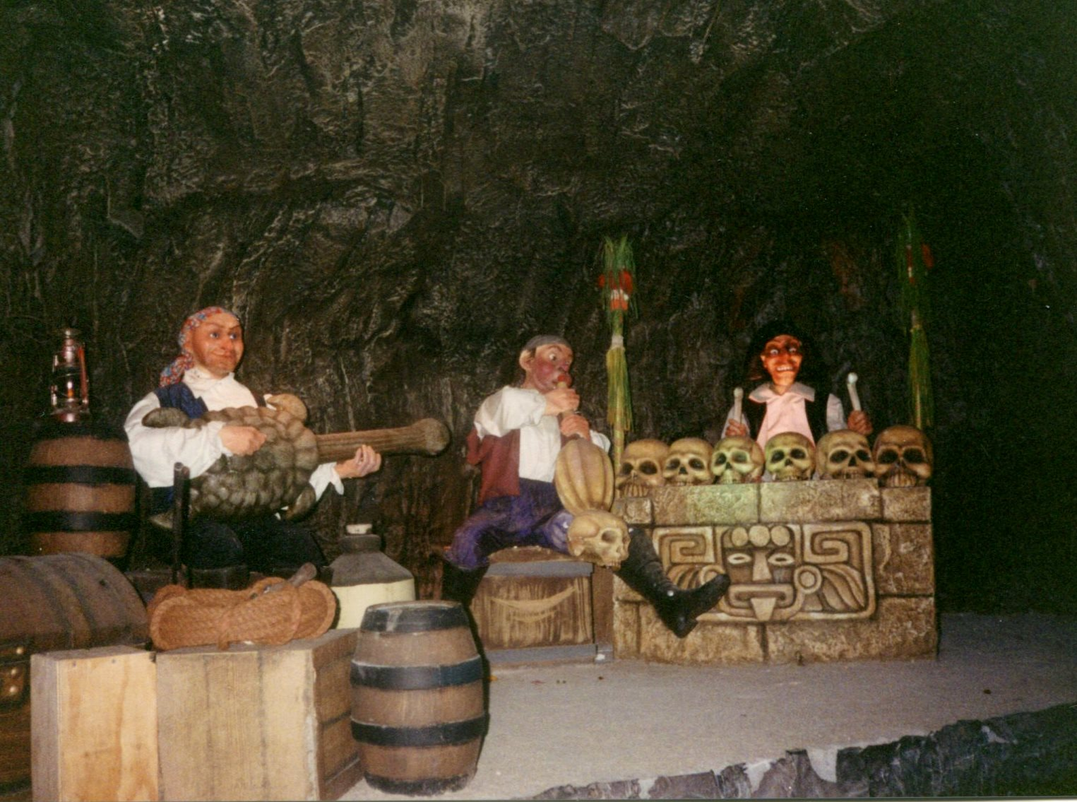 BellewaerdeLospiratasMusiciens